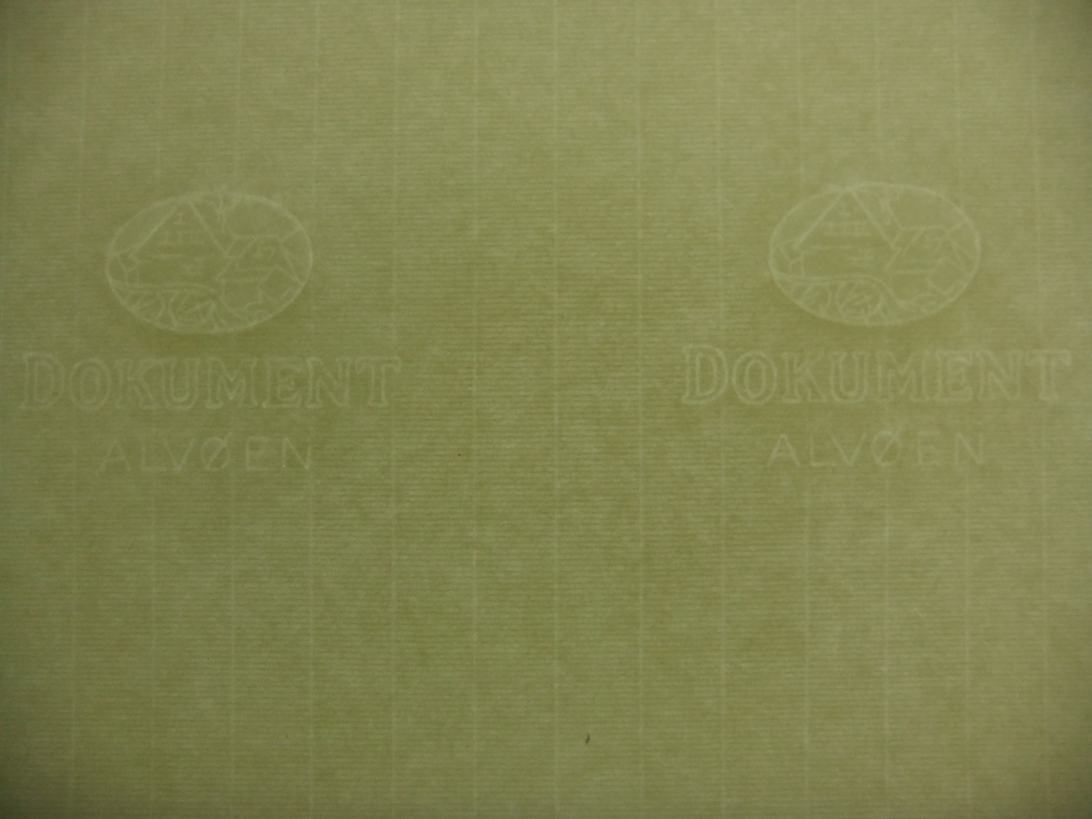 Dokumentpapir med vannmerke